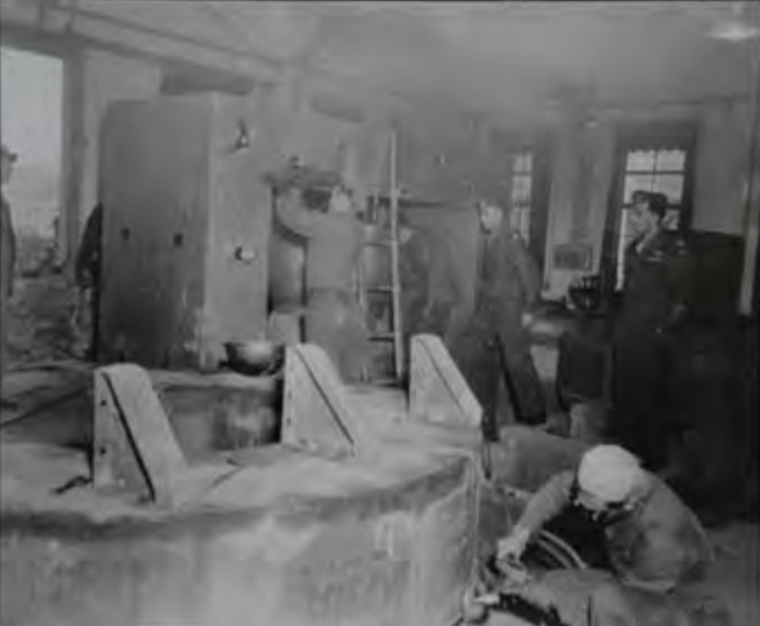 中文（台灣）: 正在被聯合國軍最高司令官總司令部拆除中的荒勝研究室考克饒夫－瓦耳頓型直線粒子加速器